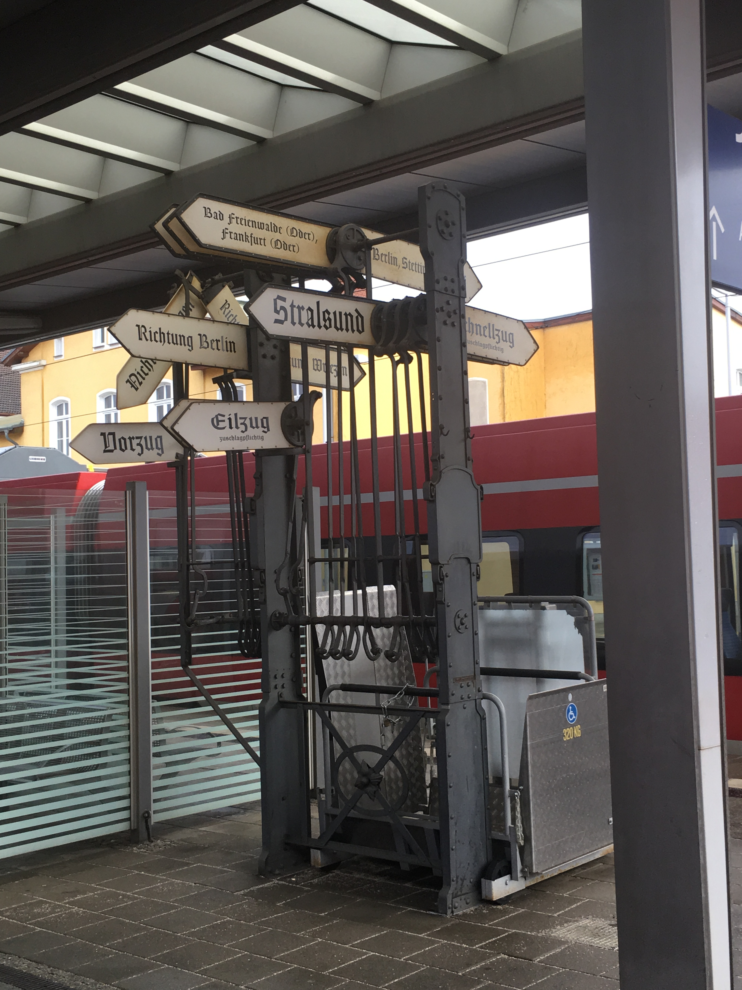 Schild am Bf